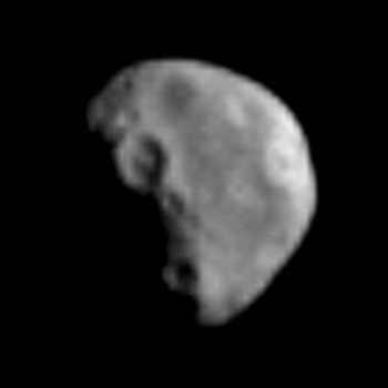 Highest-resolution image of Dactyl, moon of asteroid (243) Ida, taken by the Galileo spacecraft on August 28, 1993, from a distance of about 3900 kilometers